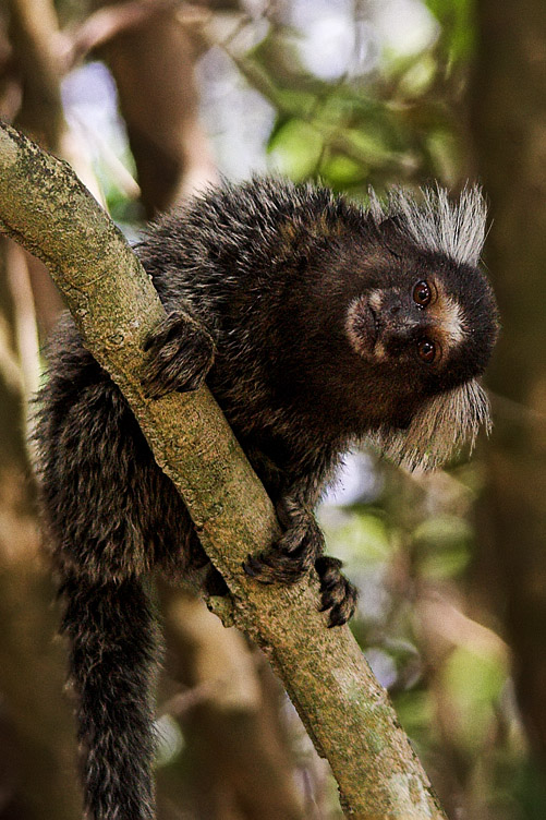 Callithrix jacchus, Tibau do Sul, Rio Grande do Norte